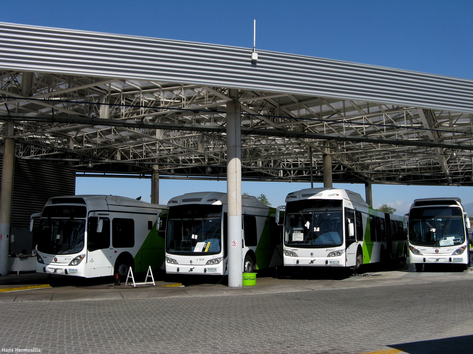 Terminal de Acopio de Buses del Troncal 2 del Transantiago